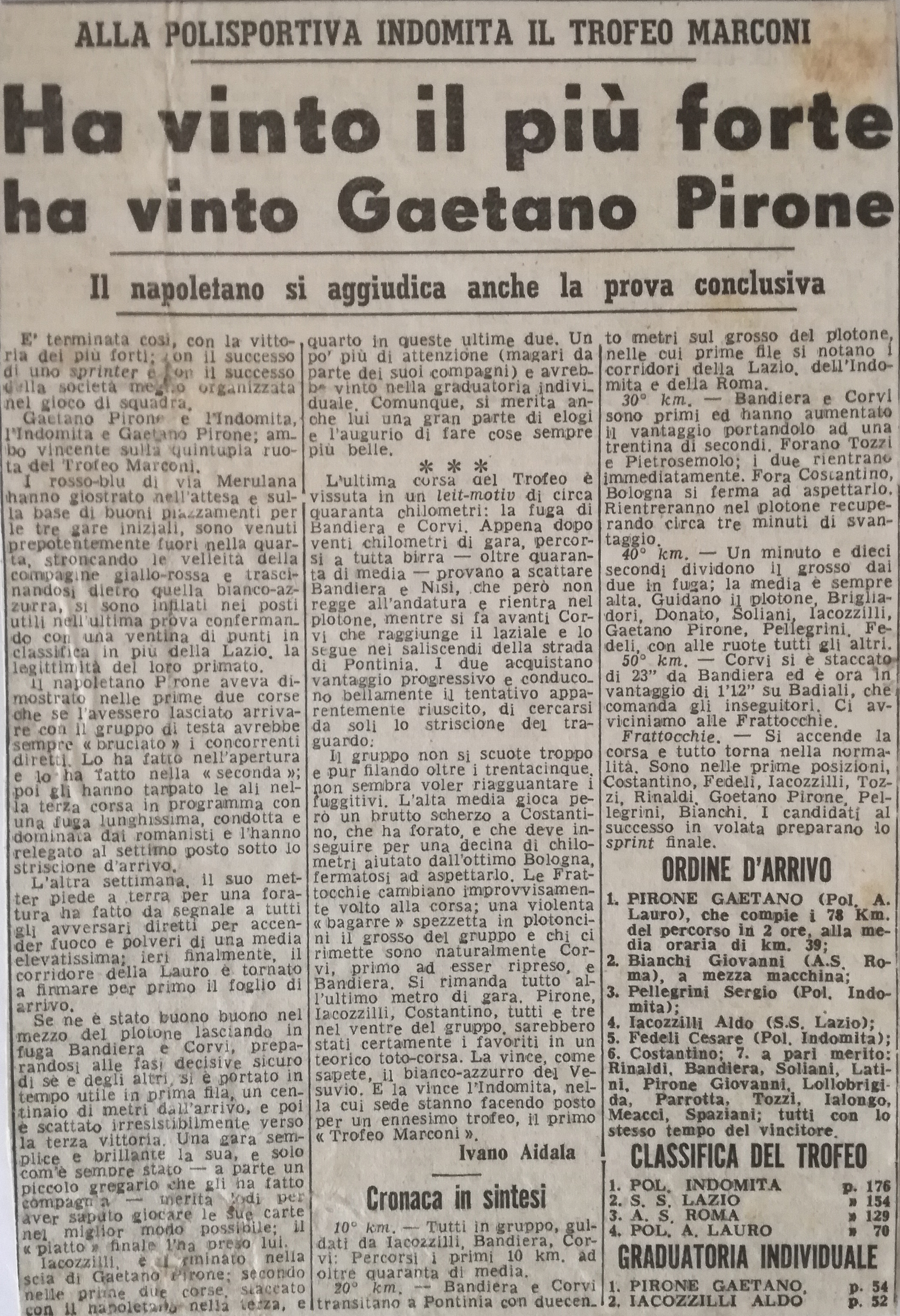 Foto di giornale storico che riporta la vittoria di Gaetano Pirone